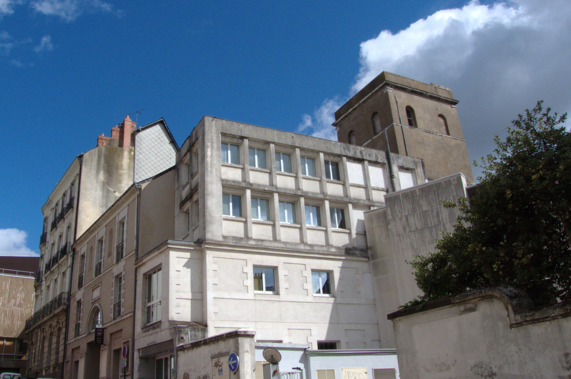 Ancien observatoire de la Marine - Nantes - Depuis la rue de Flandres-Dunkerque-40 vue sur l'ancien observatoire astronomique de la Marine. Sur la gauche après le bâtiment moderne se trouve le bâtiment de l'ancienne école d'hydrographie qui permet l'accès à la tour. .